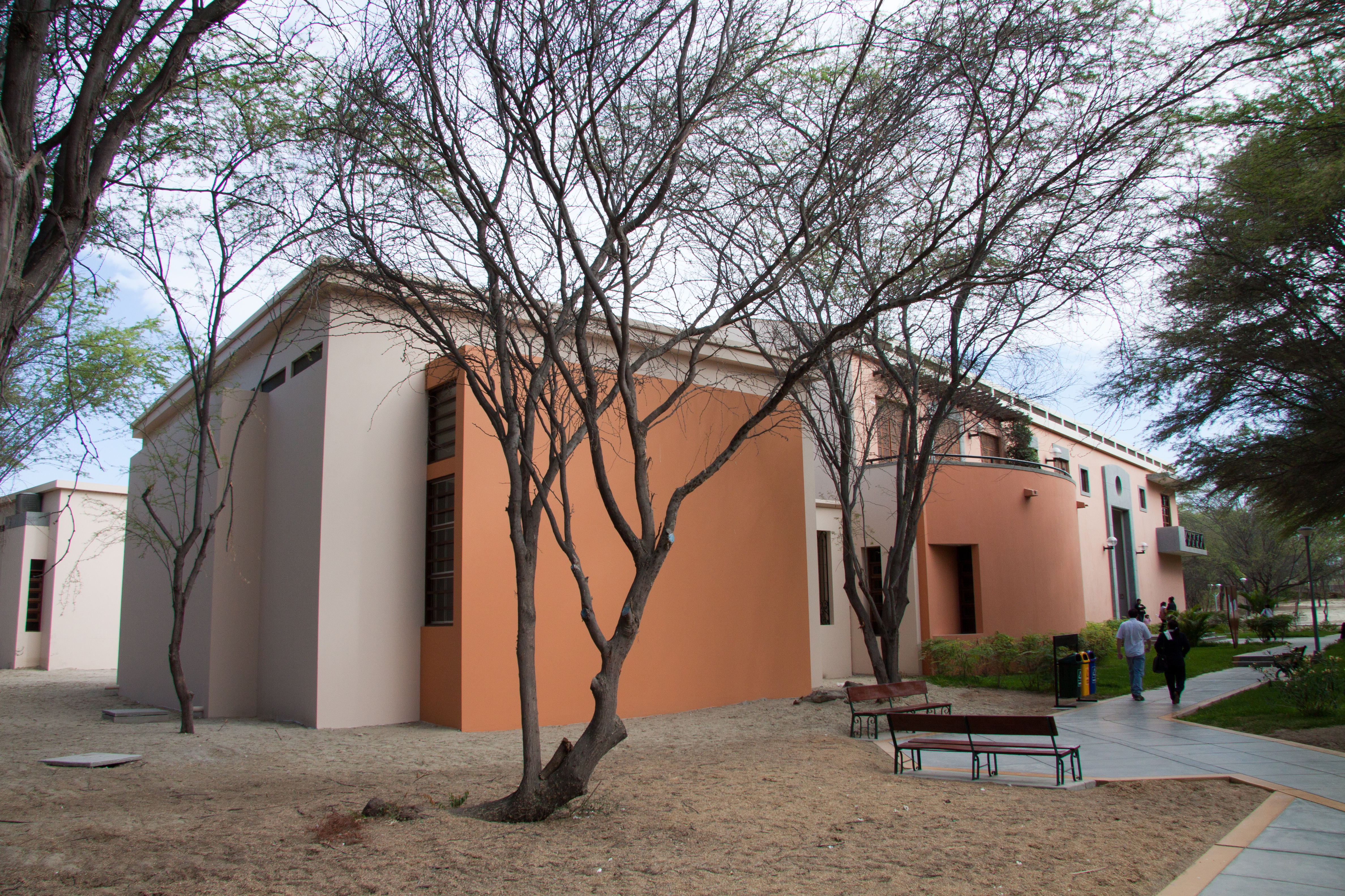 Edificio de la Facultad de Educación de la Universidad de Piura - UDEP